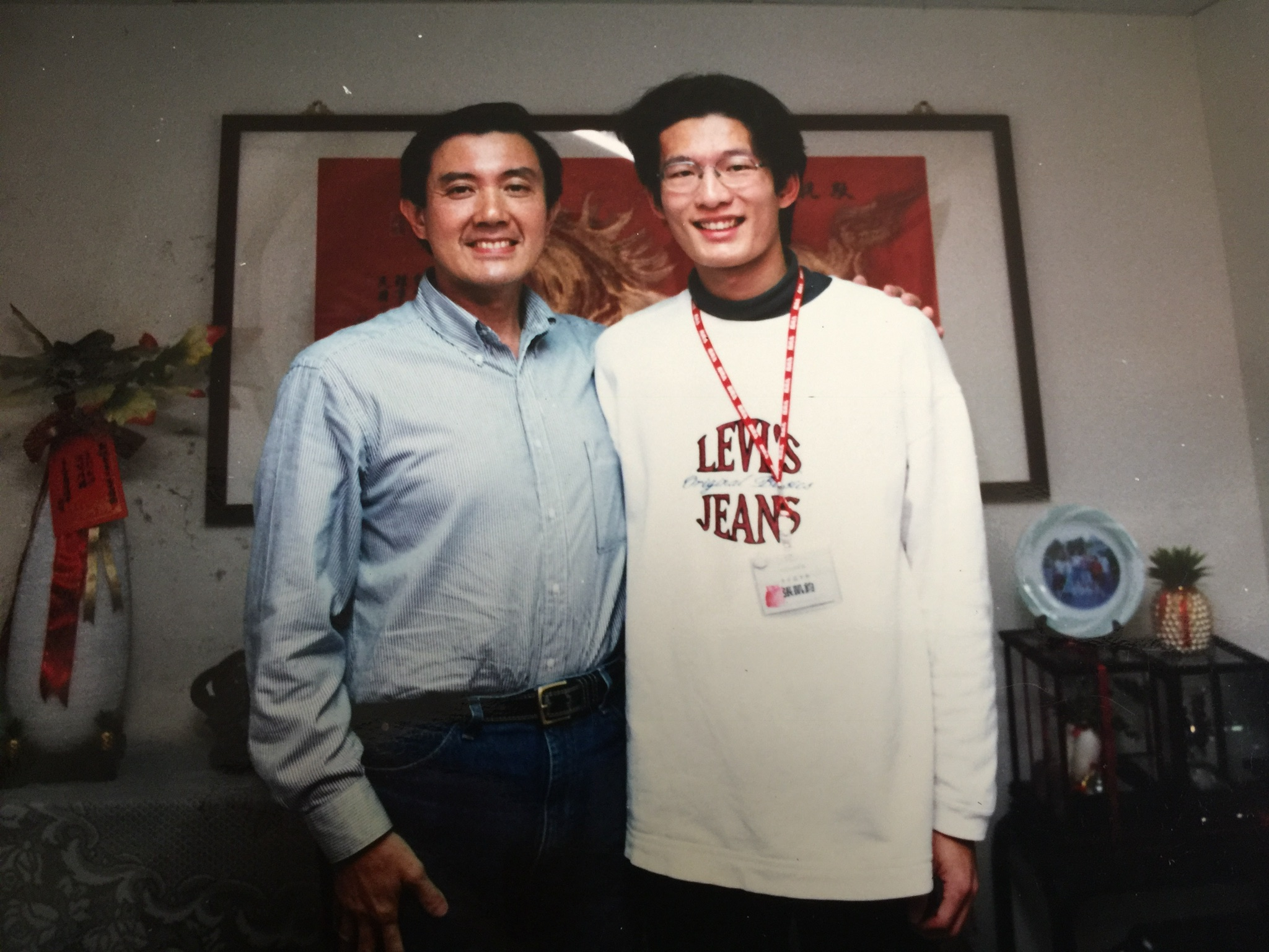 Ma Ying-jeou